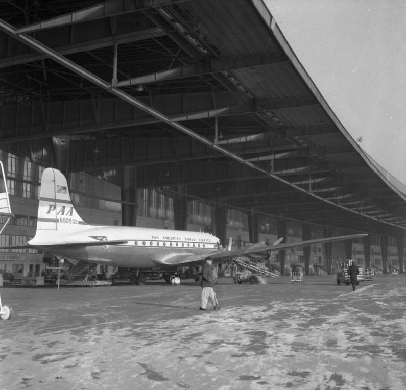 Stadtaufnahmen Berlin Flughafen Tempelhof